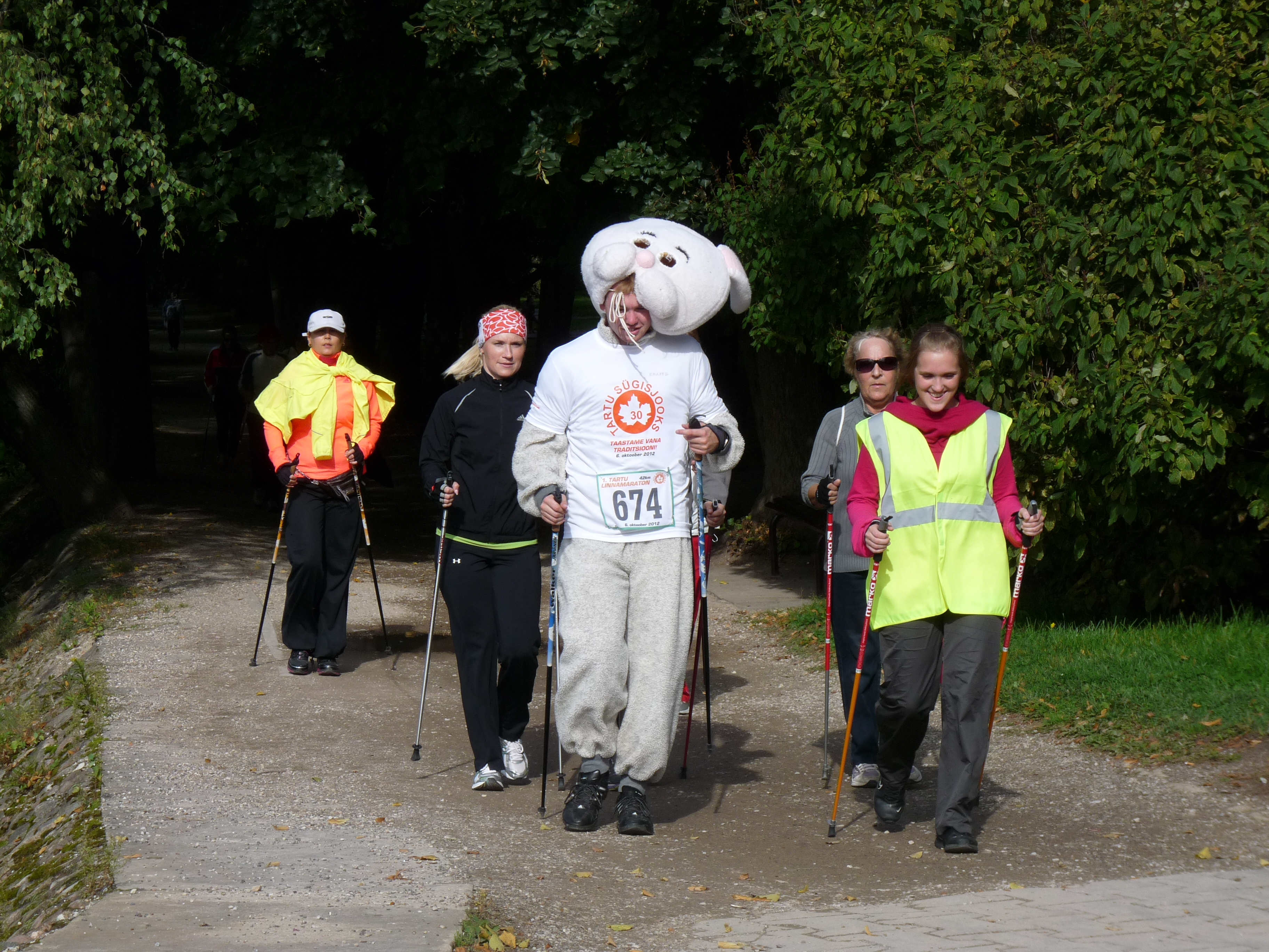 Kepikõndijad Tartu linna tervisepäeval koos päeva maskotiga, 22. september 2012